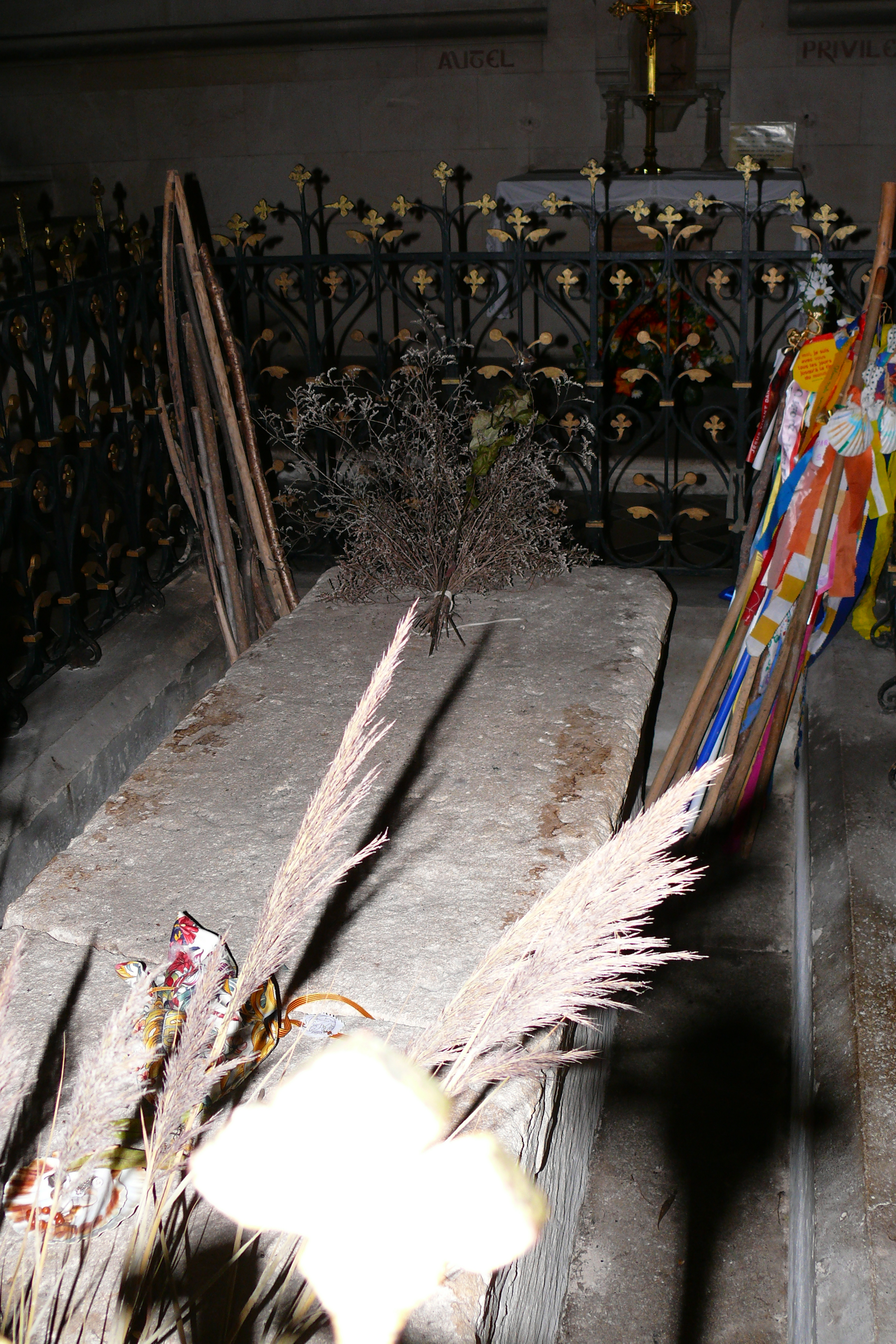 Das Aegidiusgrab in St.Gilles (Frankreich)